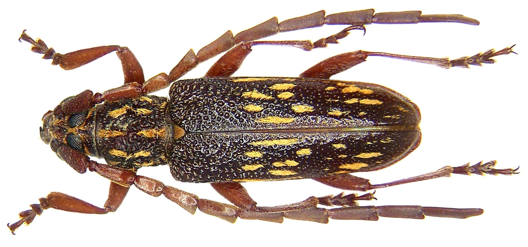 Familie: Cerambycidae Groesse: 16 mm Fundort: Malaysia, Borneo, Sabah, Trus Madi leg. W.T.E.Meng, 2004; det. A.Weigel Photo: U.Schmidt, 2006